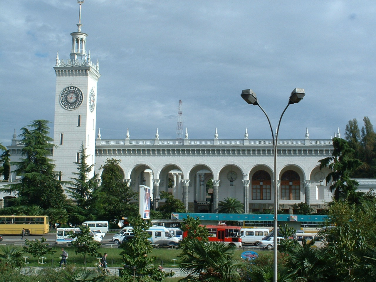 Сочи. Ж/д вокзал - 23/10/2002г.